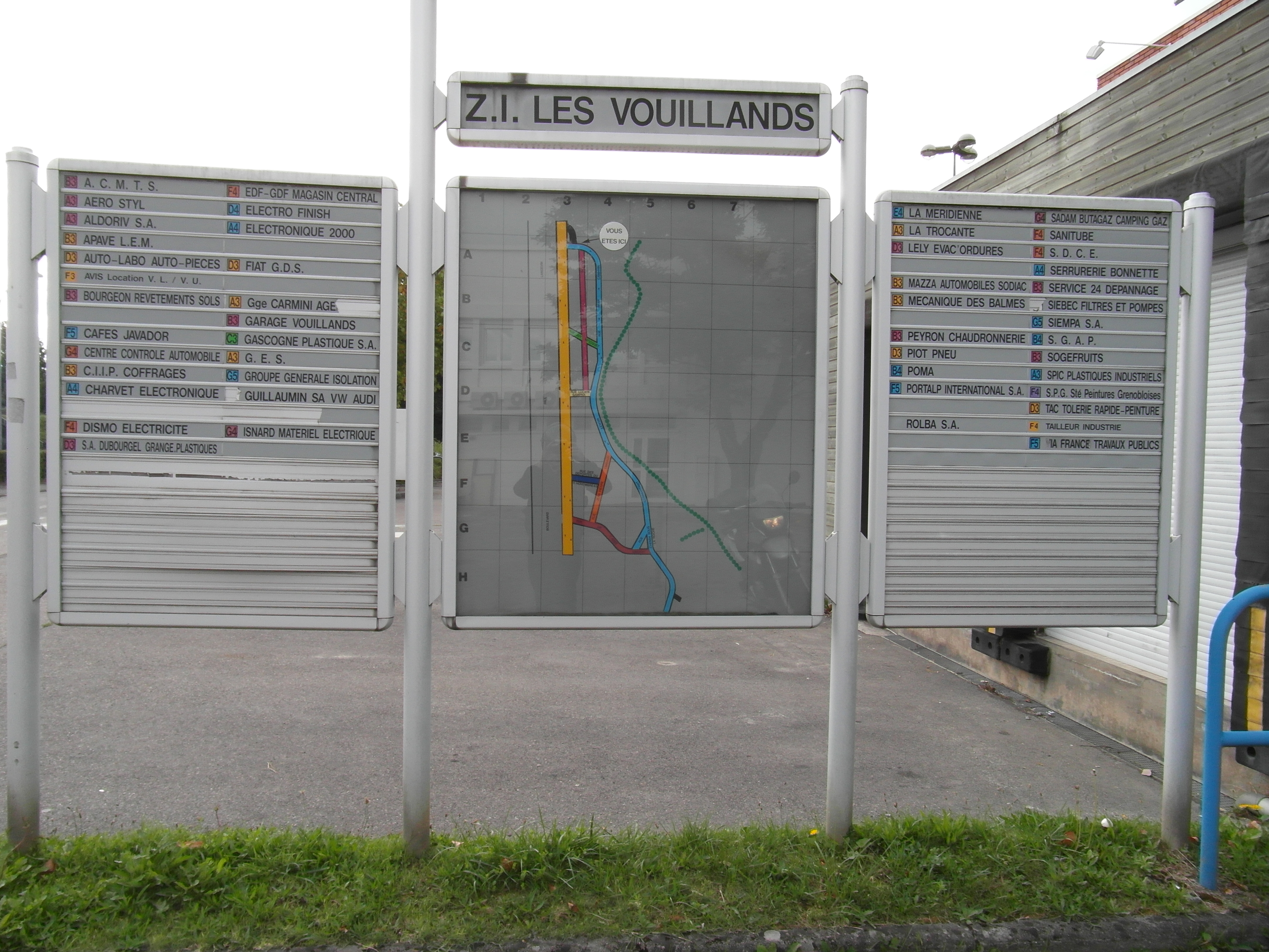 Zi des vouillands